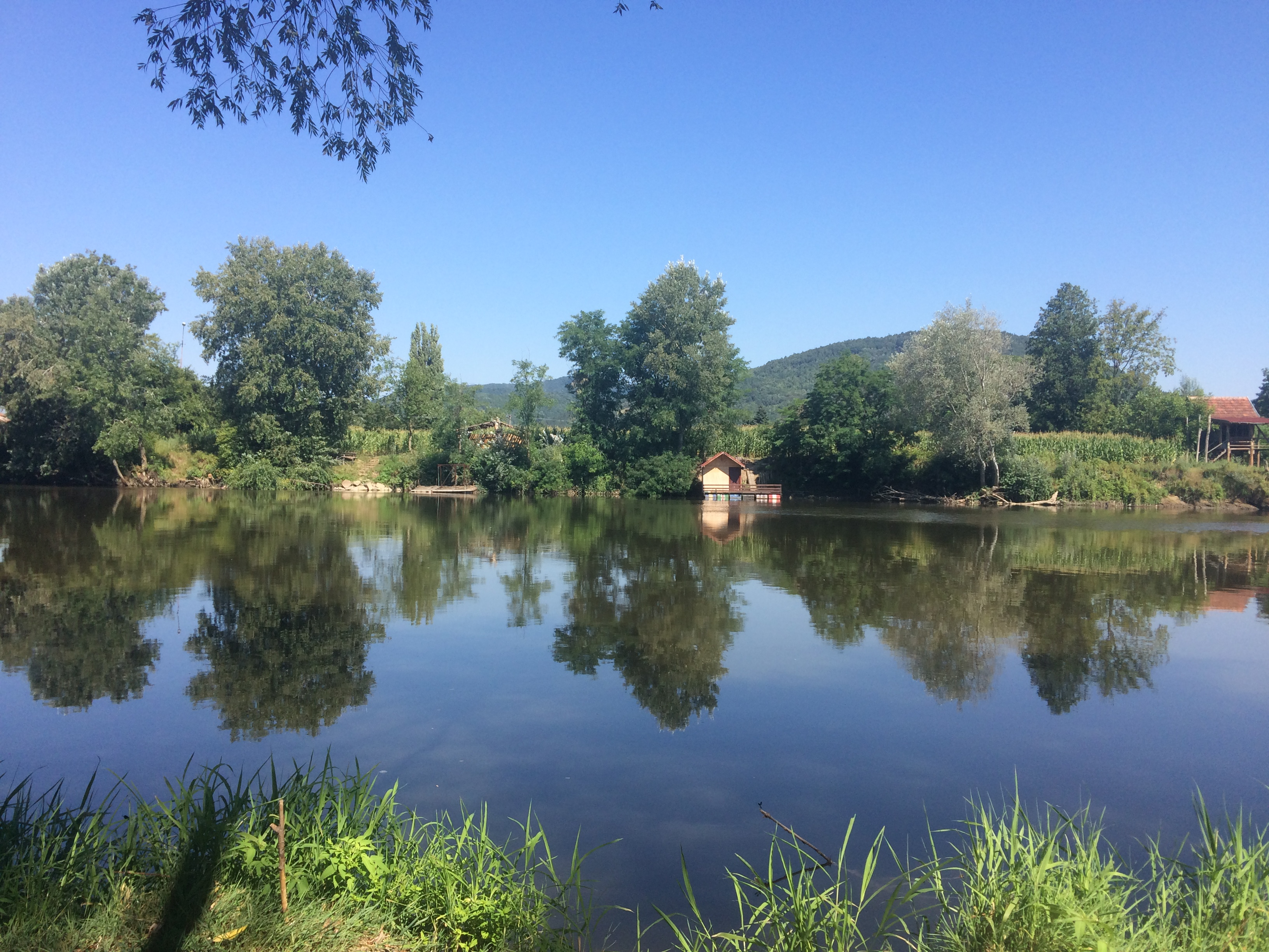 Zapadna Morava kod Trstenika